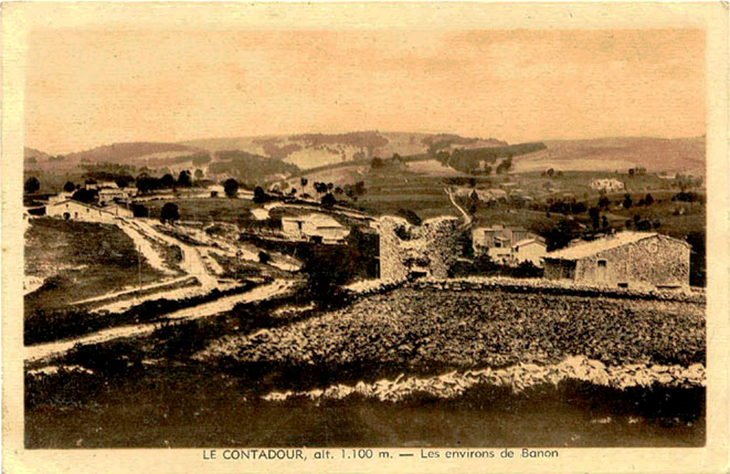 Moulin de Giono au Contadour